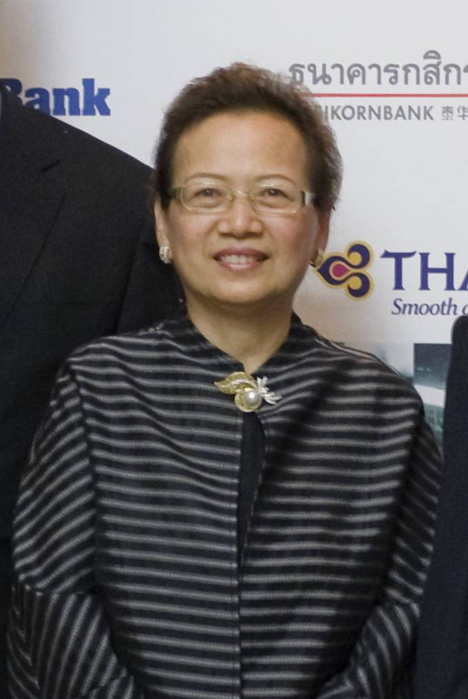 ธาริษา วัฒนเกส (center) / นายกรัฐมนตรี กล่าวสุนทรพจน์ในงาน The 4th Euromoney Thailand Investment Forum ณ โรงแรม Centara Grand Central World วันอังคาร ที่ 6 กรกฏาคม พ.ศ 2553 (Photographer attached to the Prime Minister of the Kingdom of Thailand : Peerapat Wimolrungkarat / พีรพัฒน์ วิมลรังครัตน์)